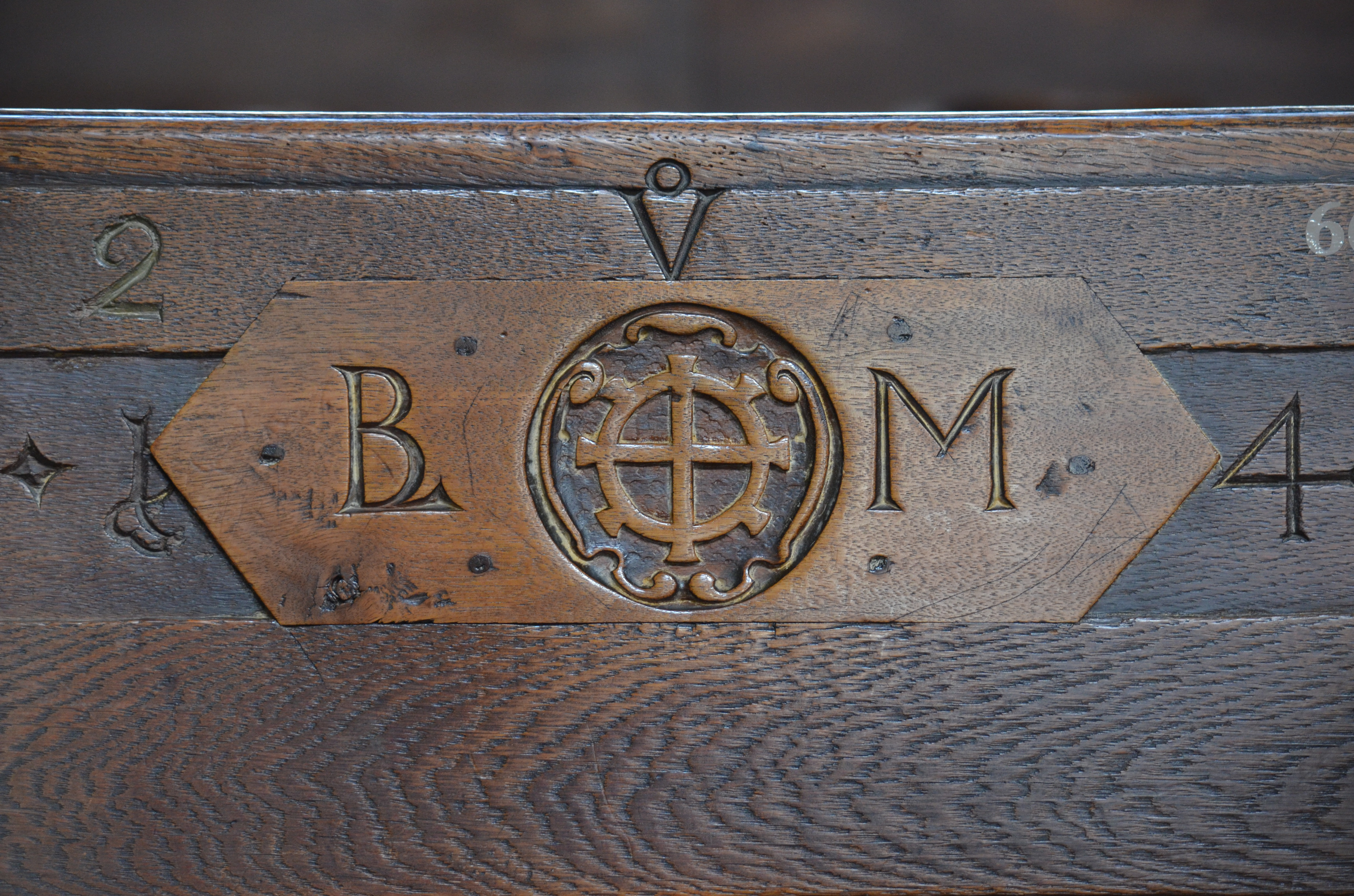 Bern, Münster, Kirchenortschild Beat Ludwig von Mülinen